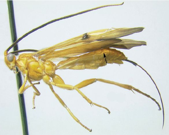 Braunsia sp.